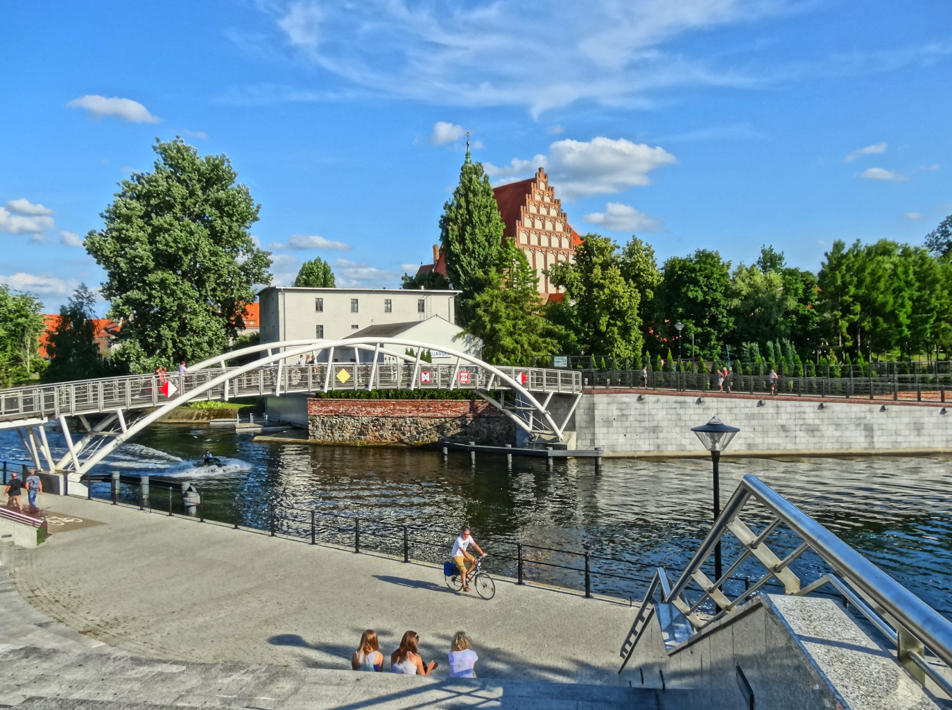 Kładka dla pieszych łącząca Wyspę Młyńską z Operą Nova i bulwarami nad Brdą